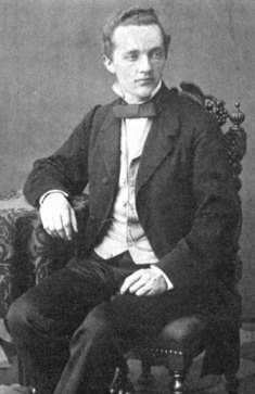 Louis Paulsen; Fotografie aus 50er/60er Jahren des 19. Jh.; Urheber nicht bekannt; (GEMEINFREI)